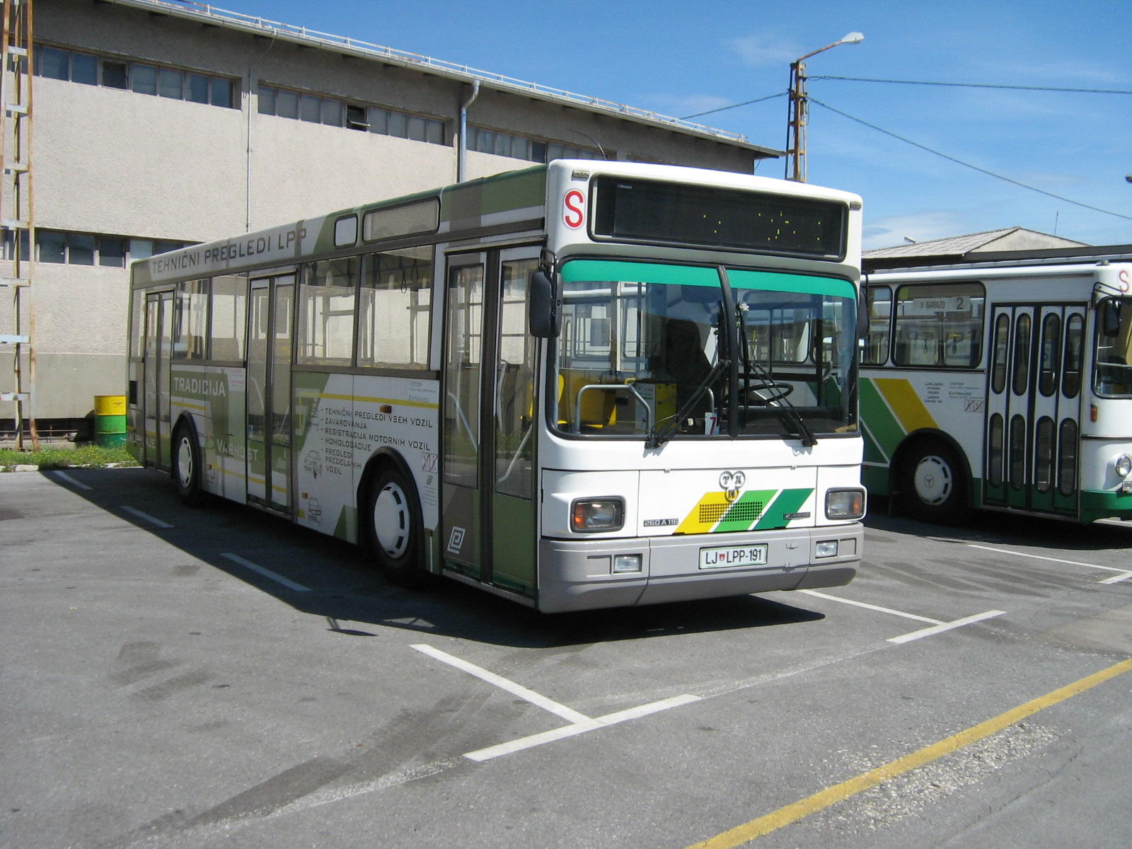 Avtobus TAM 260 A 116 v lasti Ljubljanskega potniškega prometa. Avtor: Uporabnik:BurekBuster